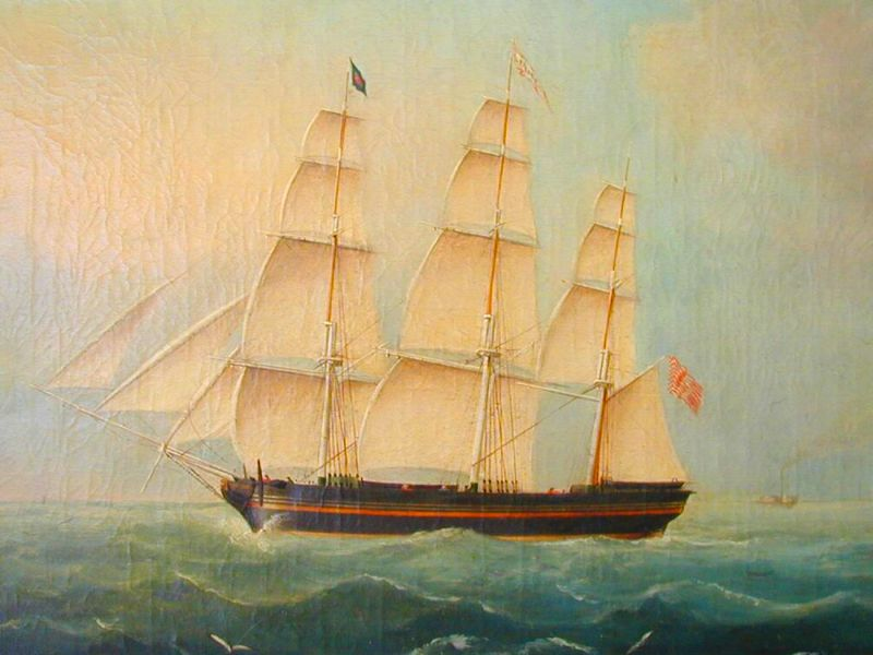 Vollschiff (Pink) „PAULINE“. Es ist ein einfaches Porträt eines Voll- oder Fregattschiffes mit simpler Wasserdarstellung und nicht besonders deutlich gemalter Takelage. Das Schiff, von Backbord vorn gesehen, läuft unter Vollzeug. Am Bug ist der Schiffsname lesbar, um den schwarzen Rumpf laufen braune Streifen, und an Deck stehen neben einer großen Kajüte Matrosen mit runden Hüten. Vom Topp des Fockmastes flattert die Reedereiflagge von H. H. Meier & Co. (blau mit rotem Rechteck und weißem M), vom Großmast ein Namenswimpel und achtern die Bremer Flagge.[1]